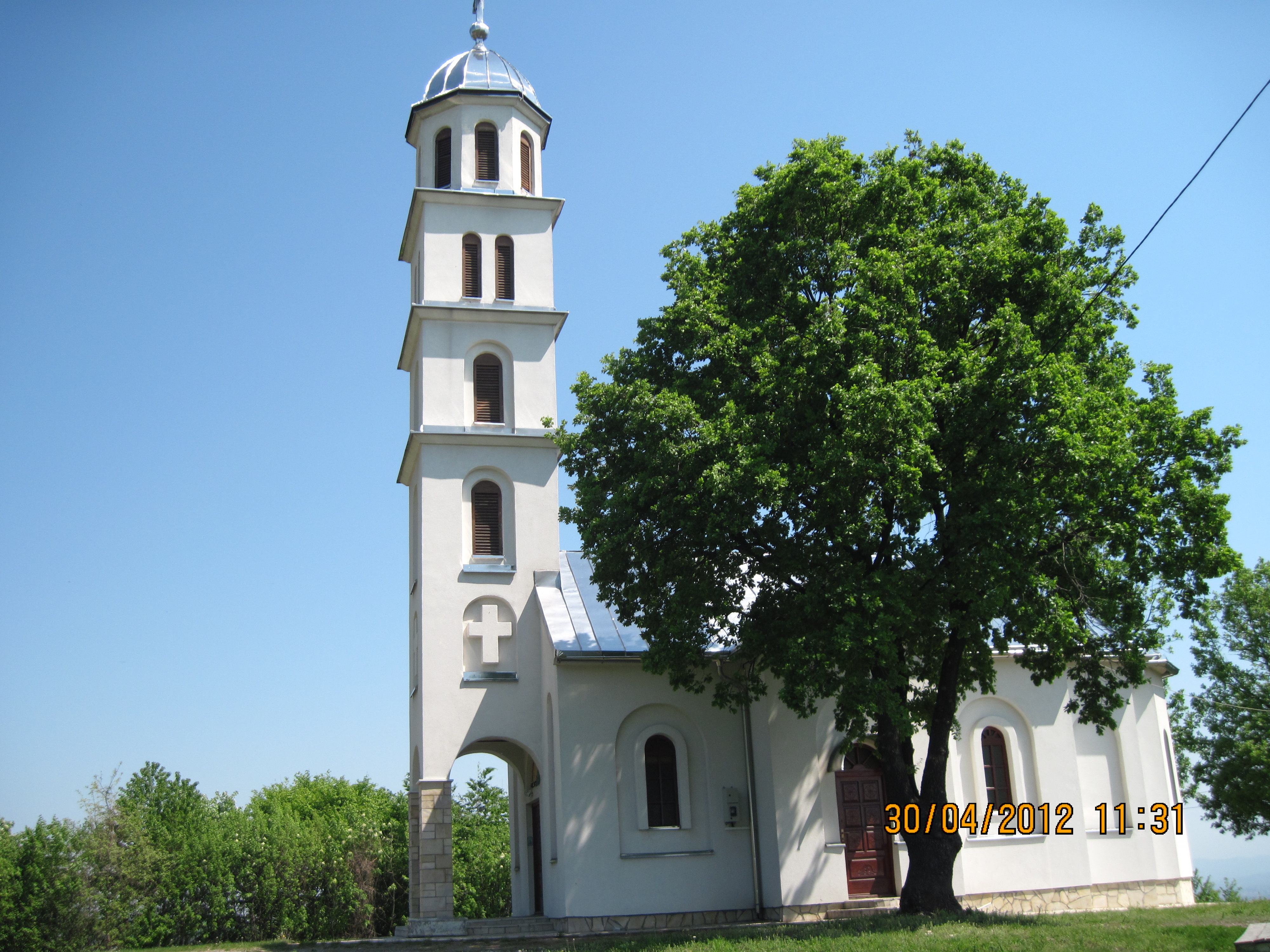 УГЉАРИ,црква на Тојића црквини